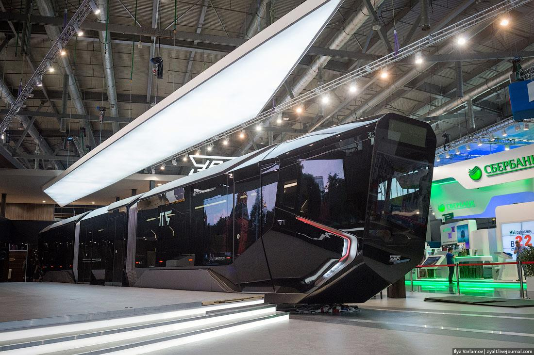 Трамвай R1 на выставке "Иннопром-2014"